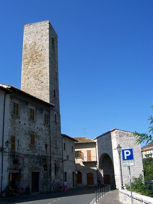 Ascoli Piceno - Torre di Solestà